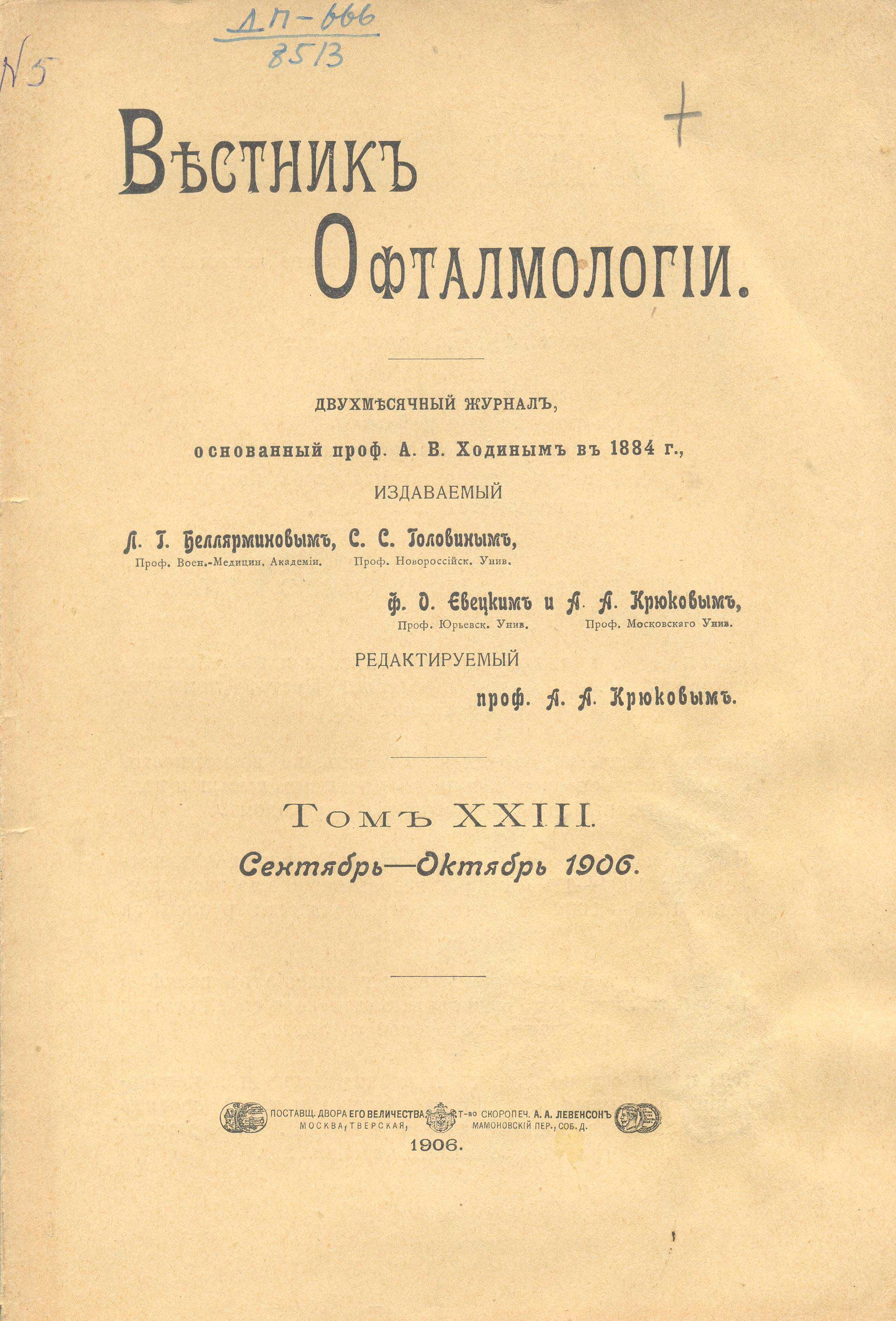 Вестник офтальмологии. 1906. Сентябрь-октябрь. — Титульный лист